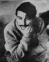 Jorge Vazquez Viana